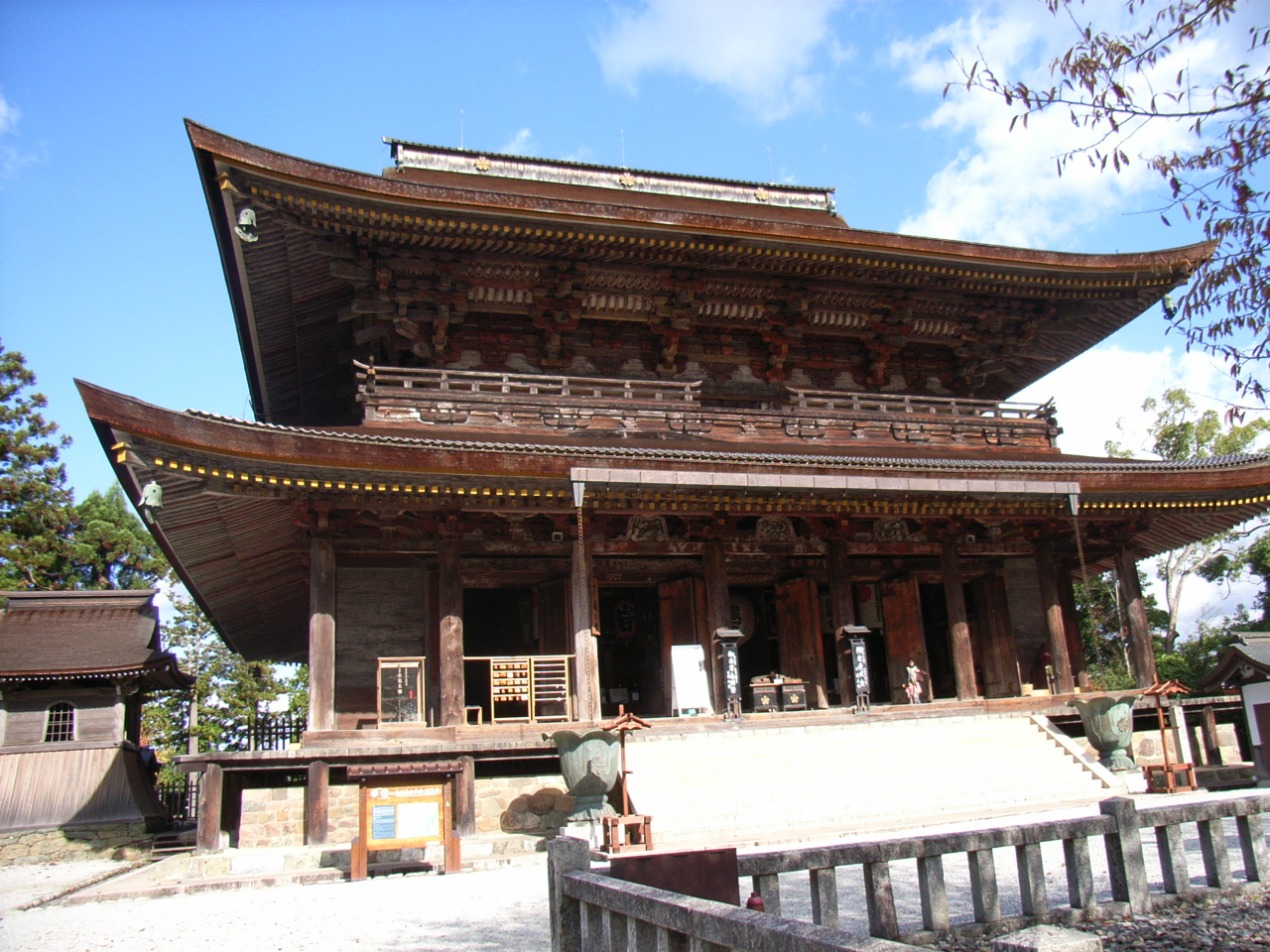 Ёсино - храм Кимпусэн-дзи Ёсино, Нара - храм Кимпусэн-дзи, главный павильон Дзао-до